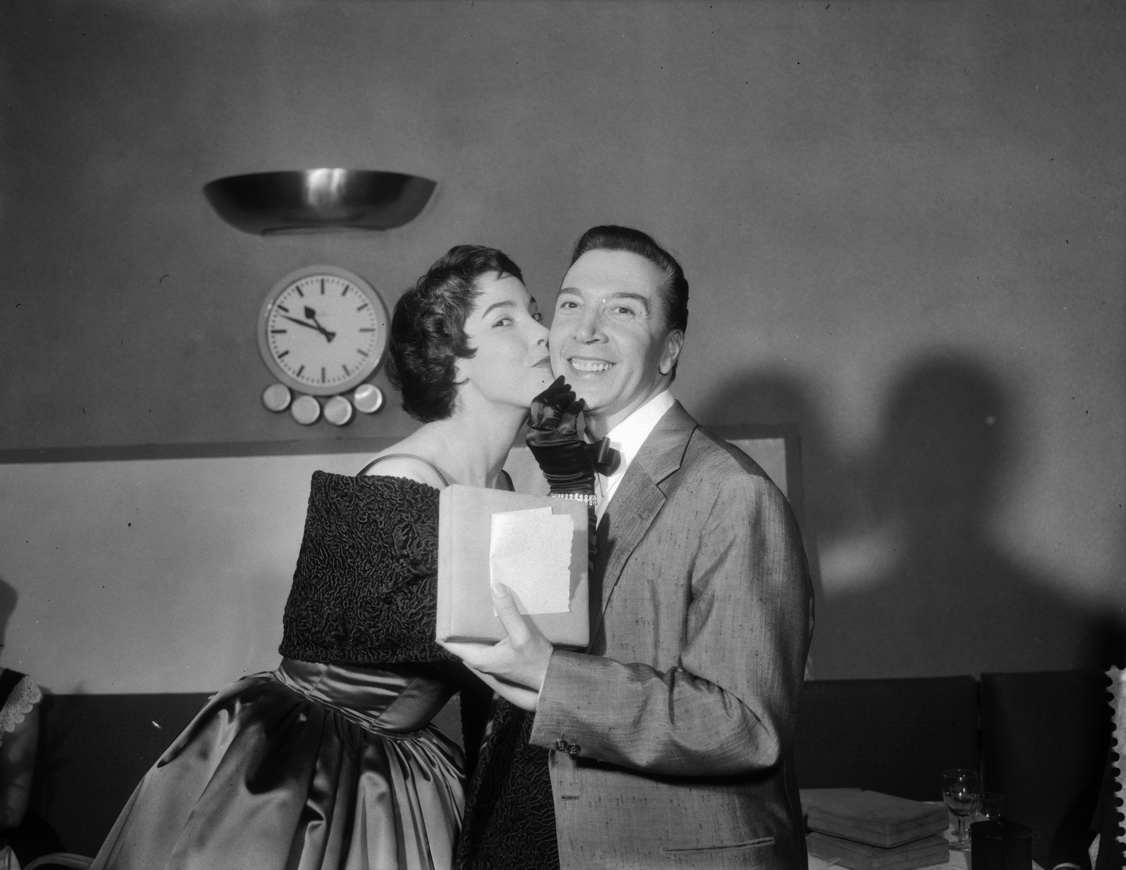 Corry Brokken et André Claveau. Mars 1958. Hilversum (Pays-Bas)